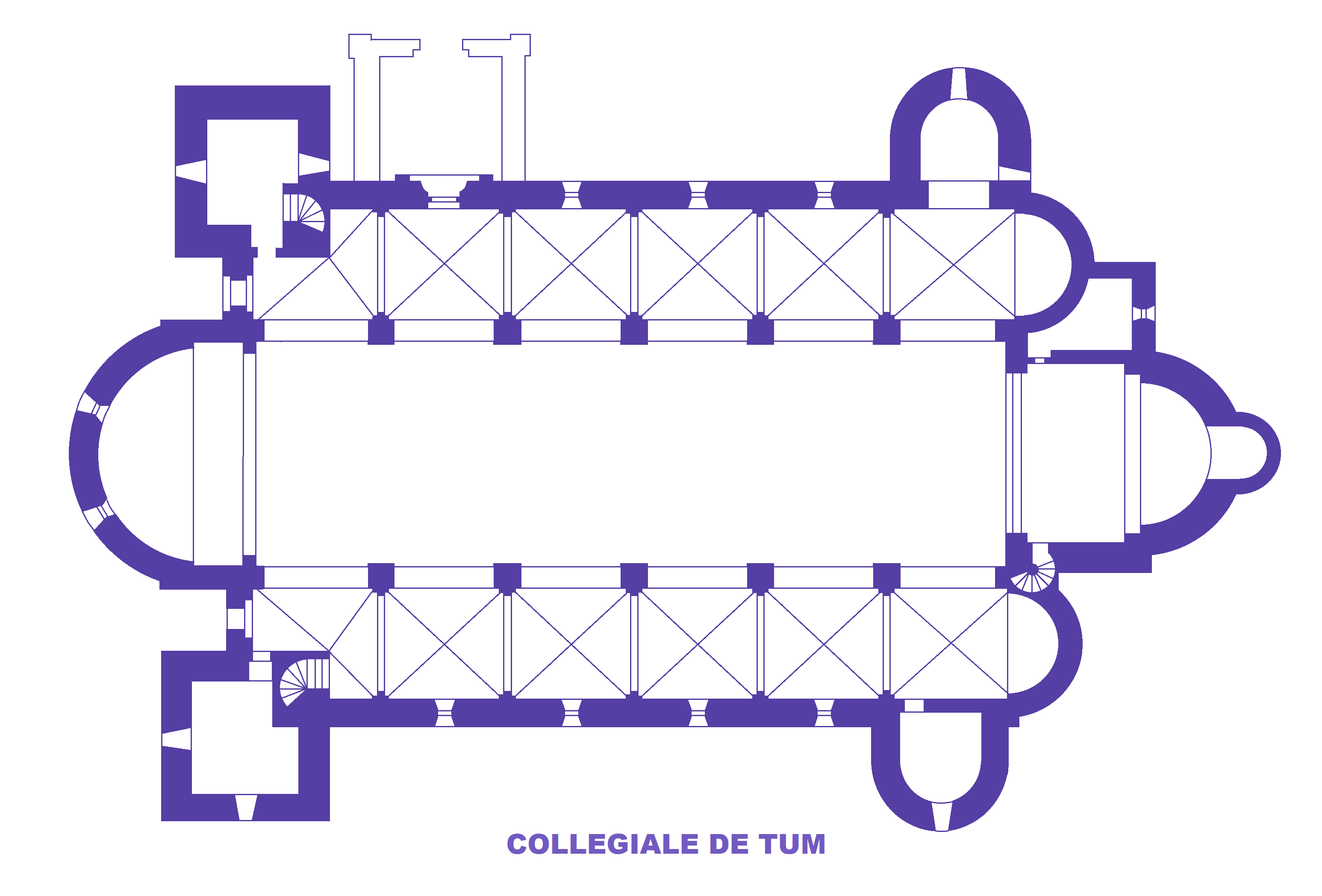 Tum, Pologne, plan de la collégiale